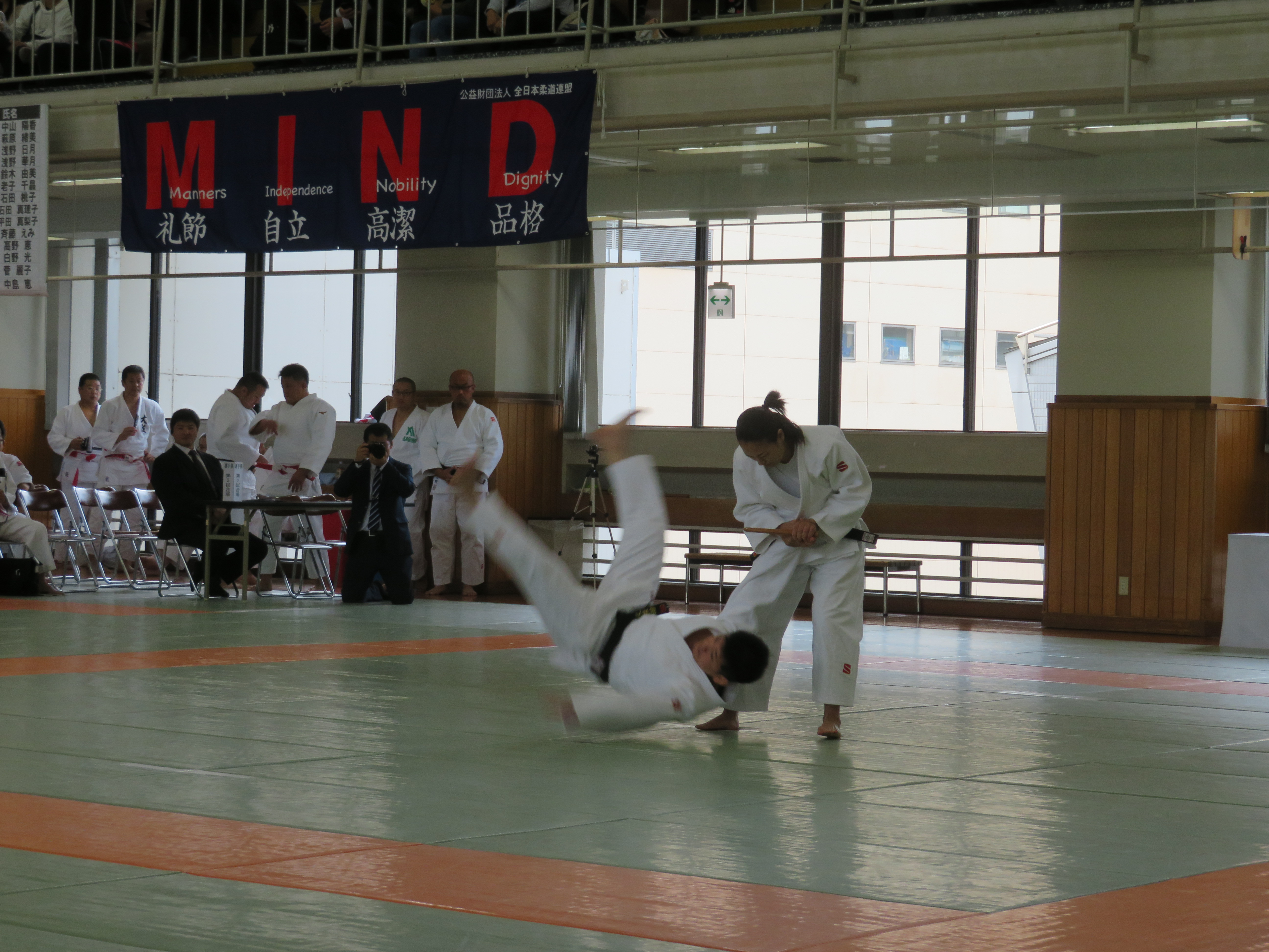 競技会の演技